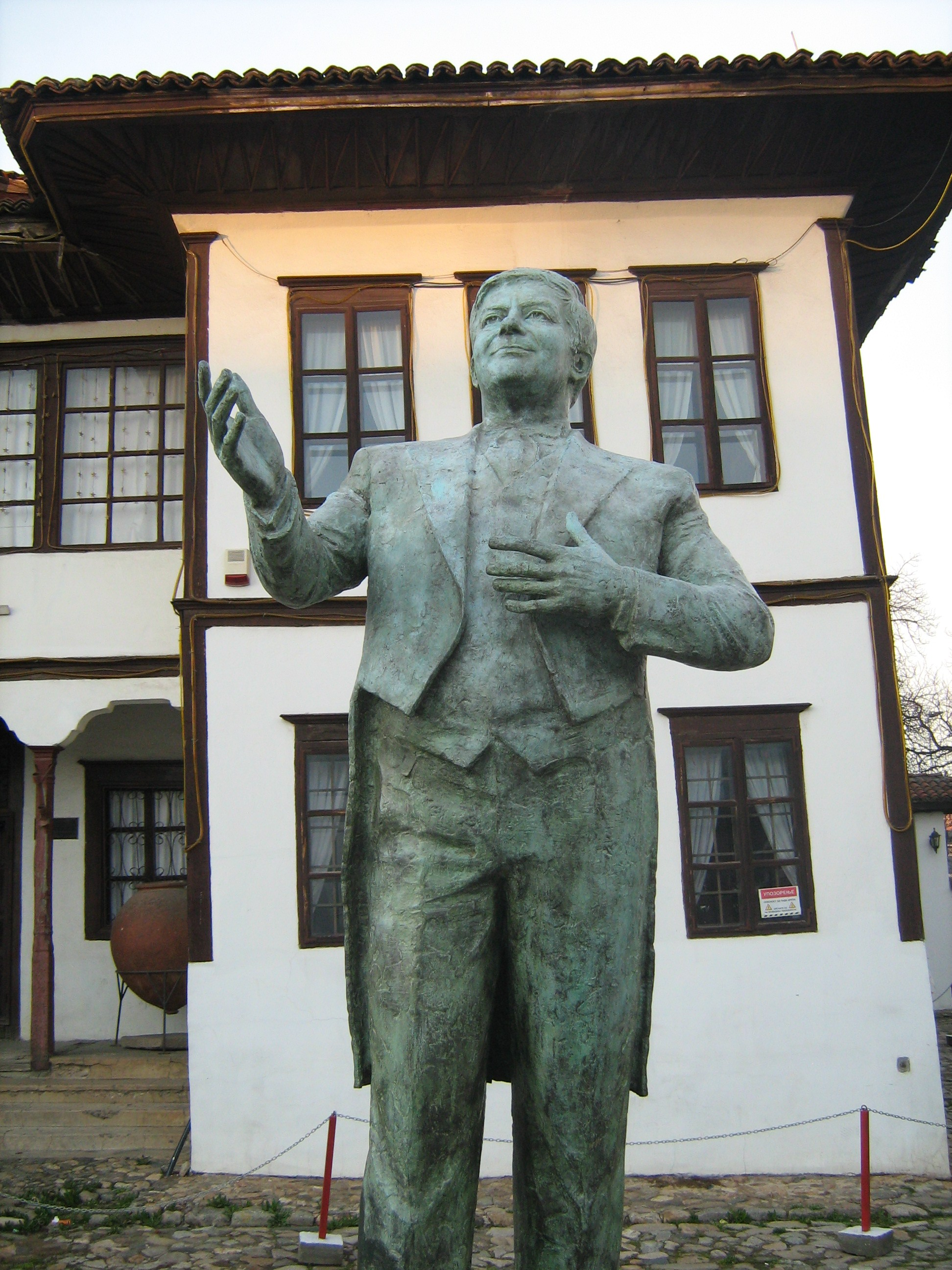 Пашин конак - салемлук, зграда Народног музеја у Врању